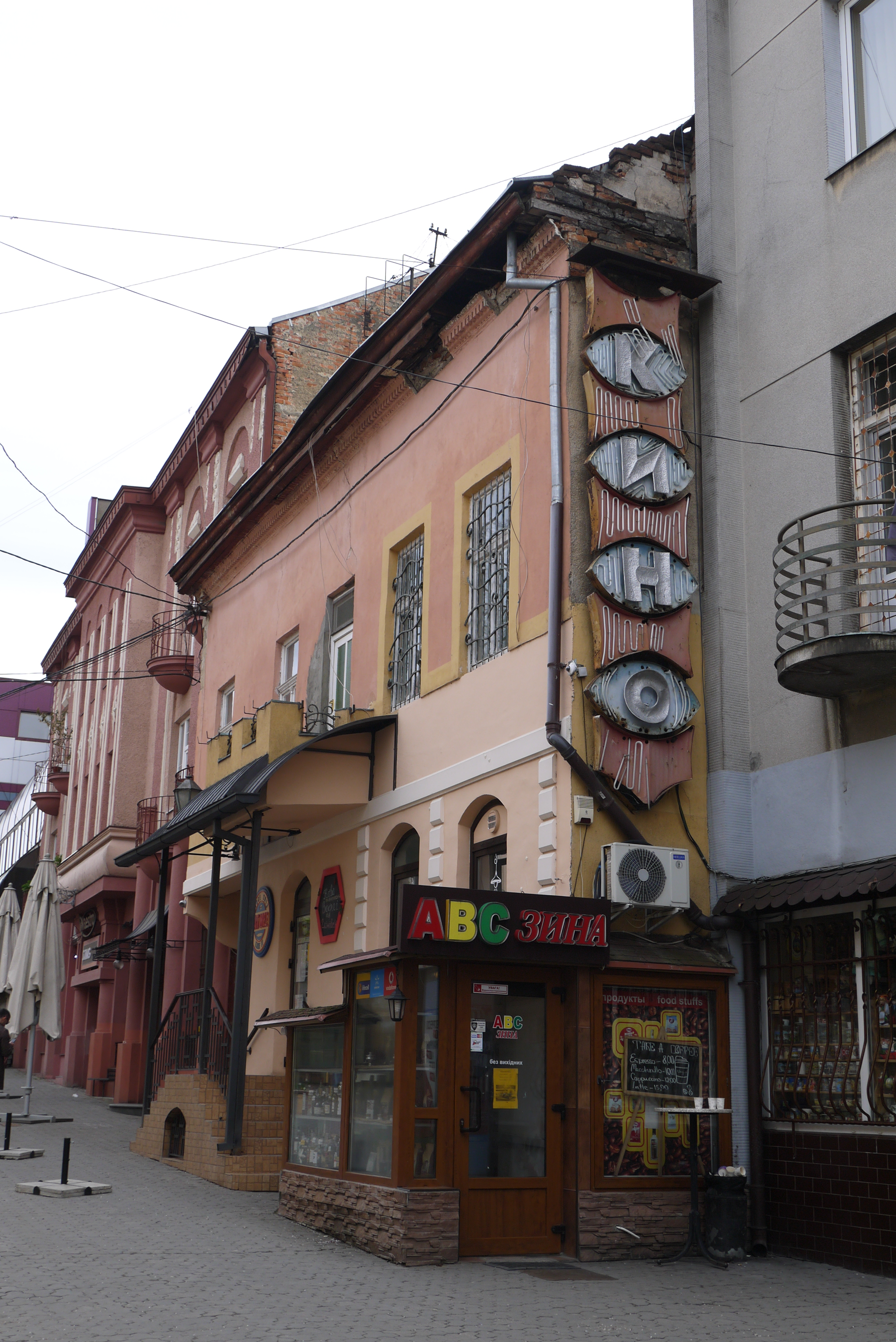 Житловий будинок, Ужгород, вул. Волошина, 22